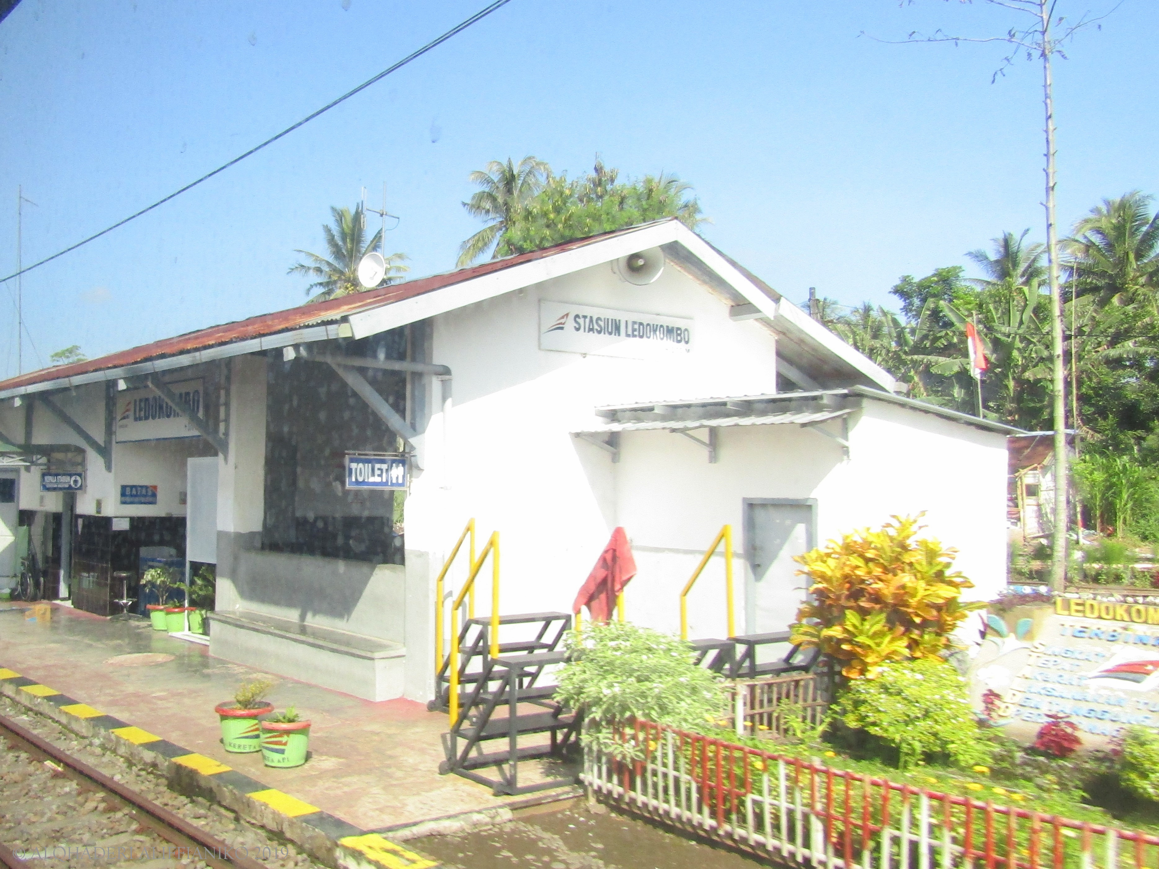 Stasiun Ledokombo, dilihat dari peron